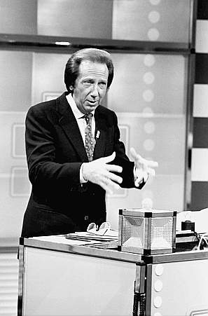 Il presentatore televisivo Mike Bongiorno durante una puntata del quiz "Flash" del 1981.